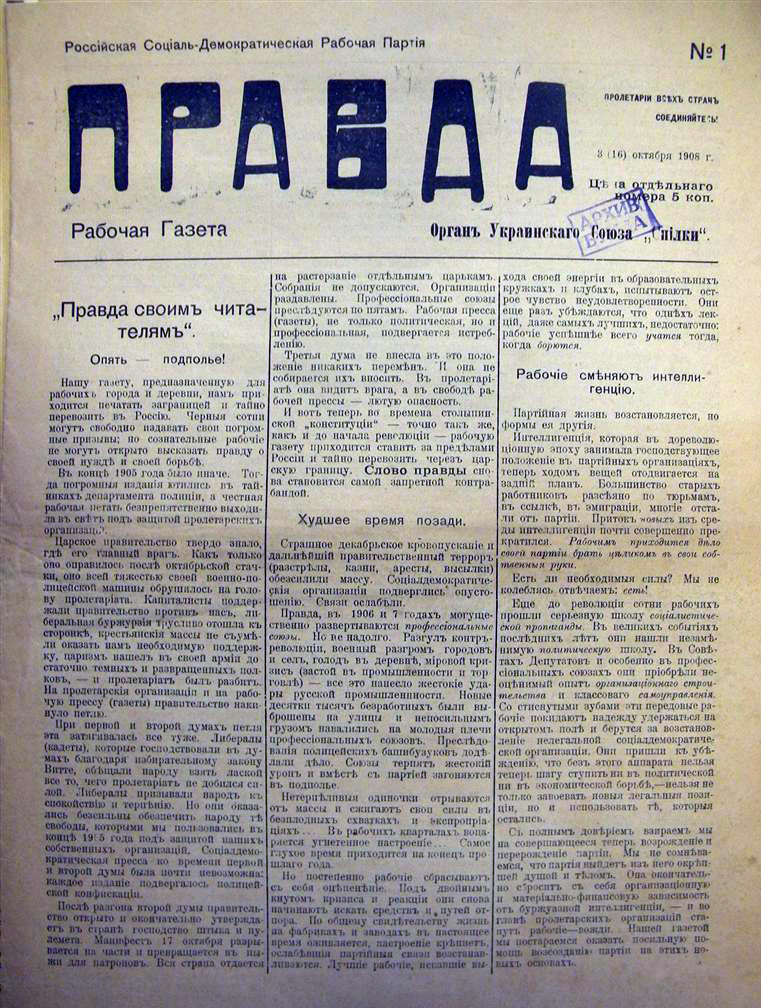 Венская „Правда“ (первый номер, 1908)